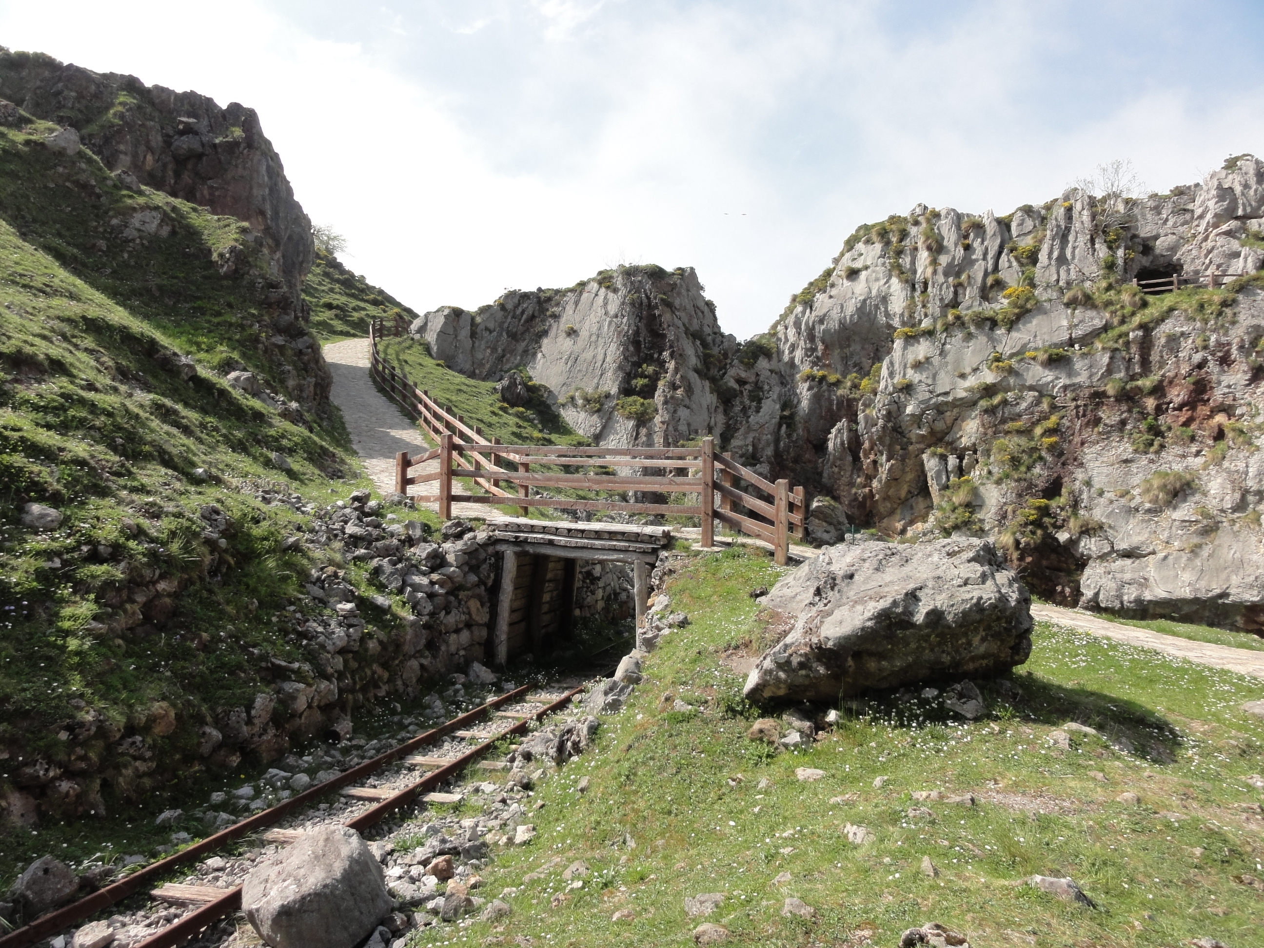 Antiguas Minas de Buferrera en el Parque Nacional de los Picos de Europa This is a photography of a Site of Community Importance in Spain with the ID: ES1200001. Natura2000 entry, EEA entry